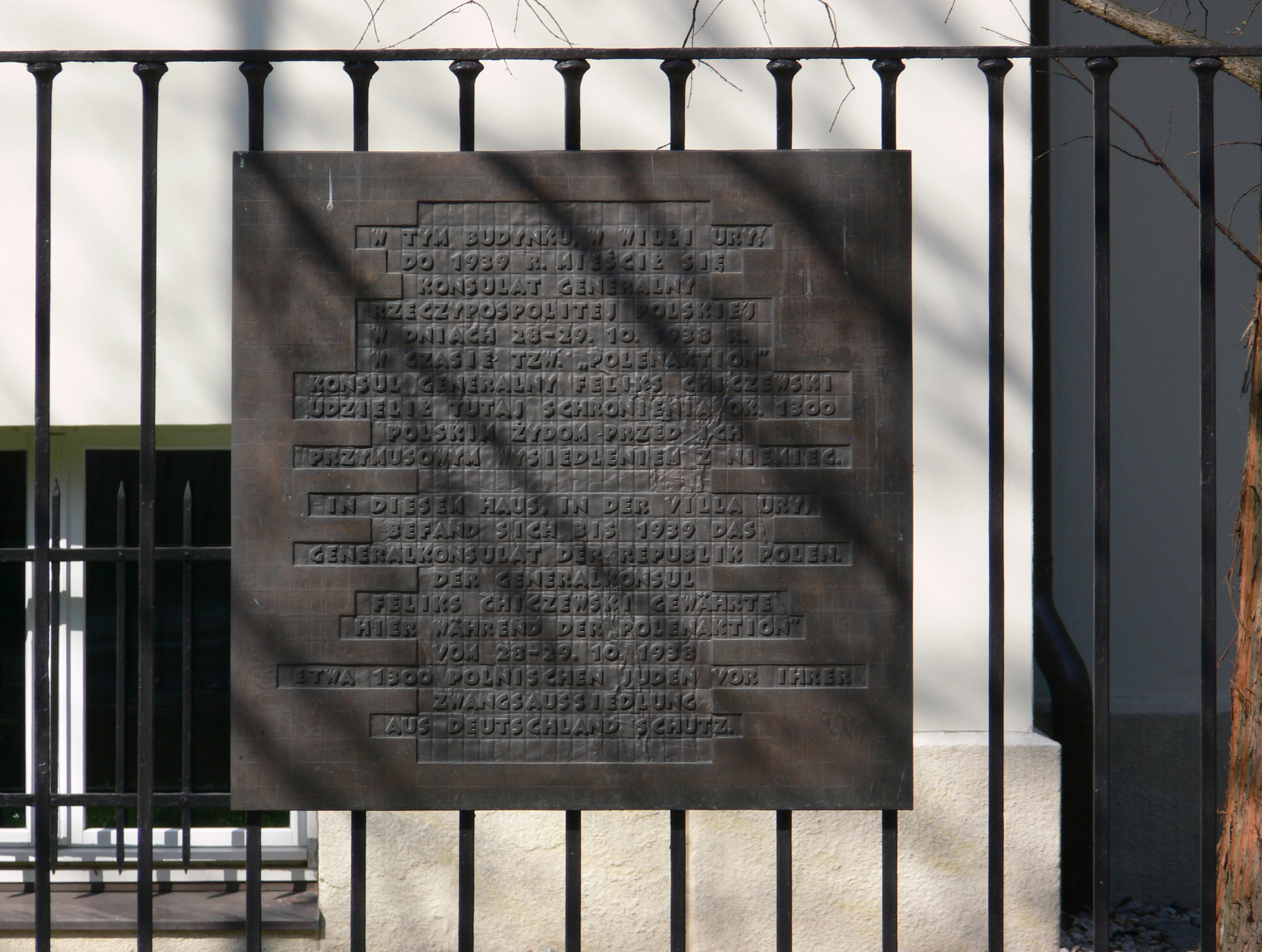 Leipzig, Vila Ury, Wächterstr. 32, Gedenktafel.